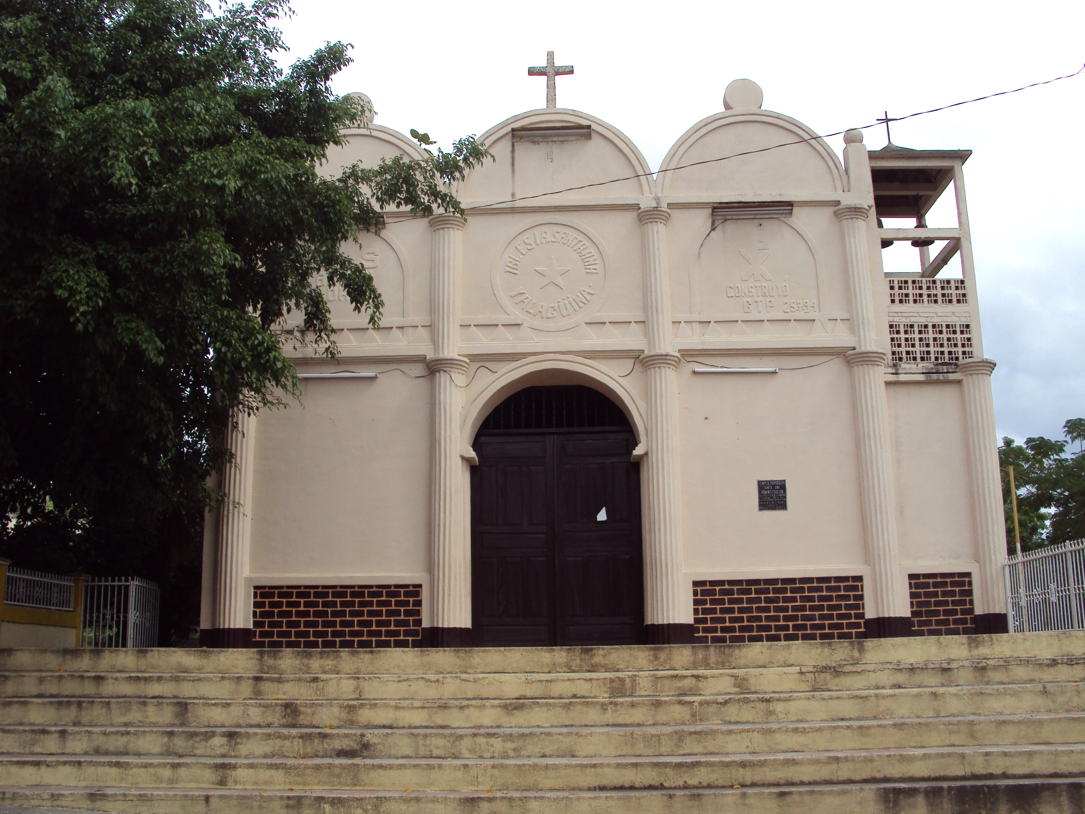 Iglesia Santa Ana, Yalagüina